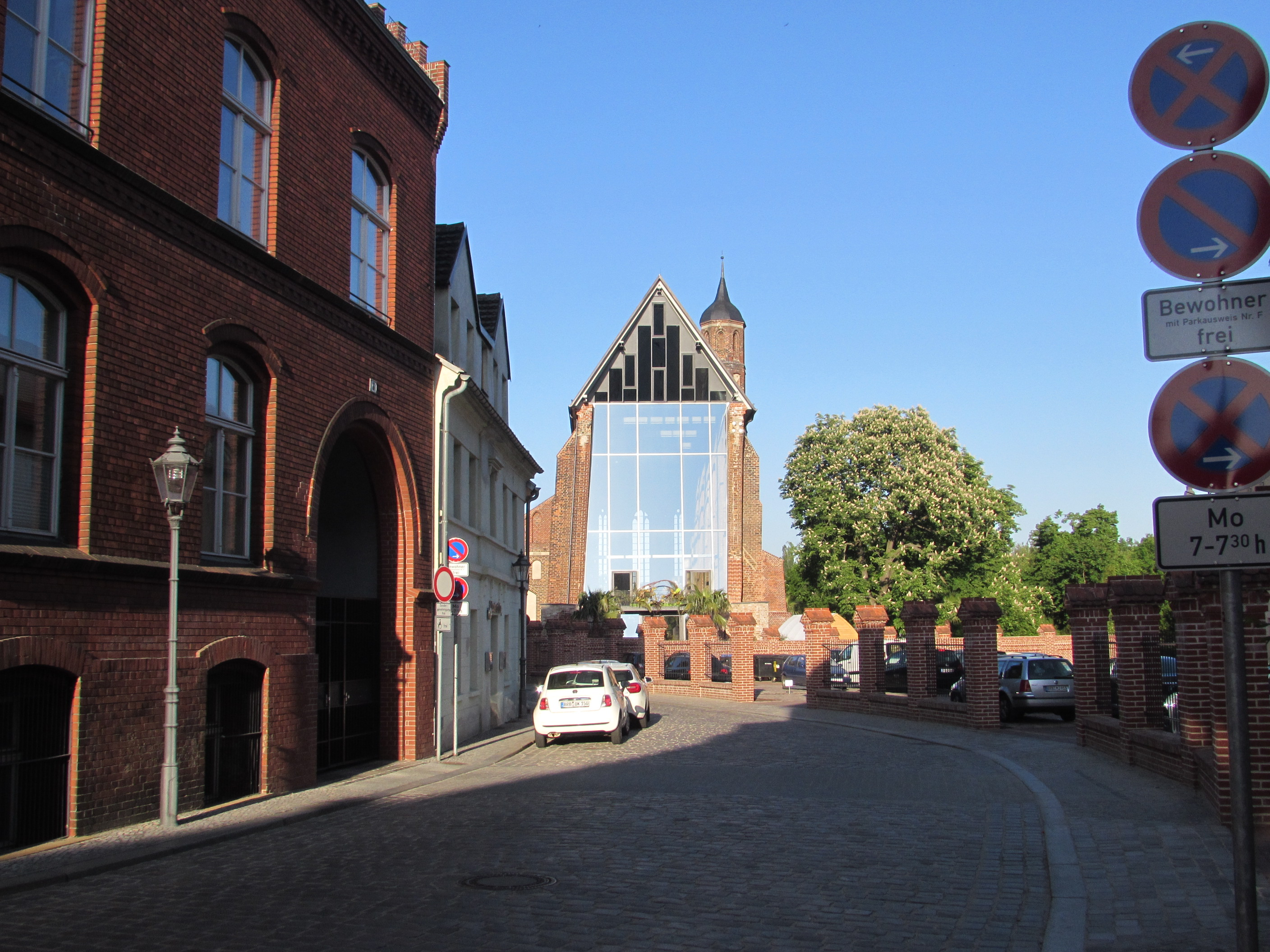 blick auf st. johannis aus der klosterstraße